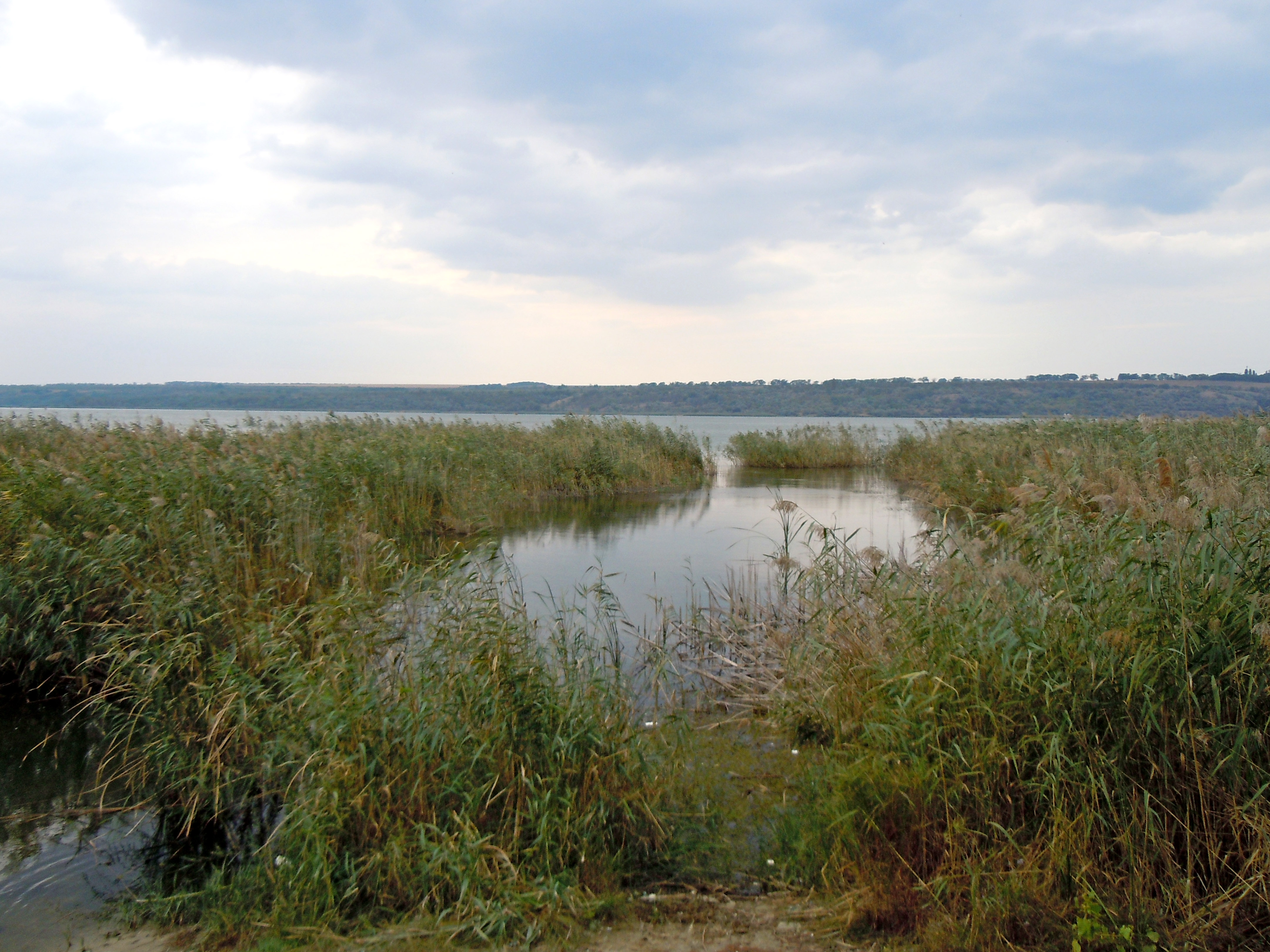 Земський сад, Болград, Міський парк ім. О.С. Пушкіна